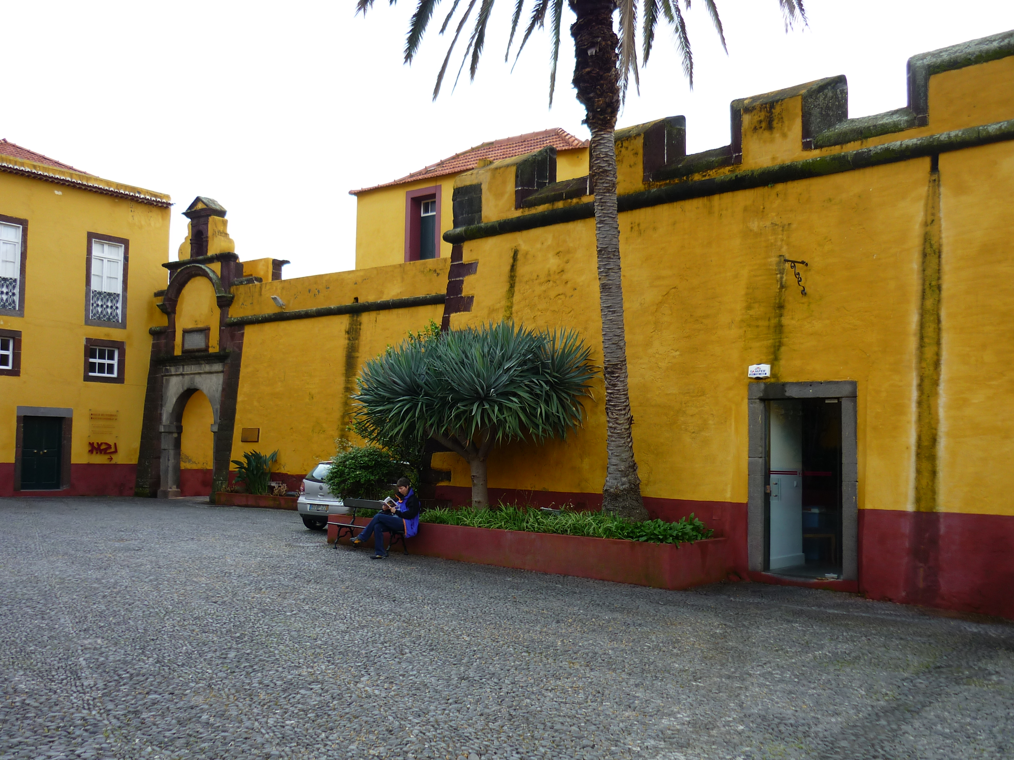 A Fortaleza de São Tiago erőd udvara (Madeira, Funchal)